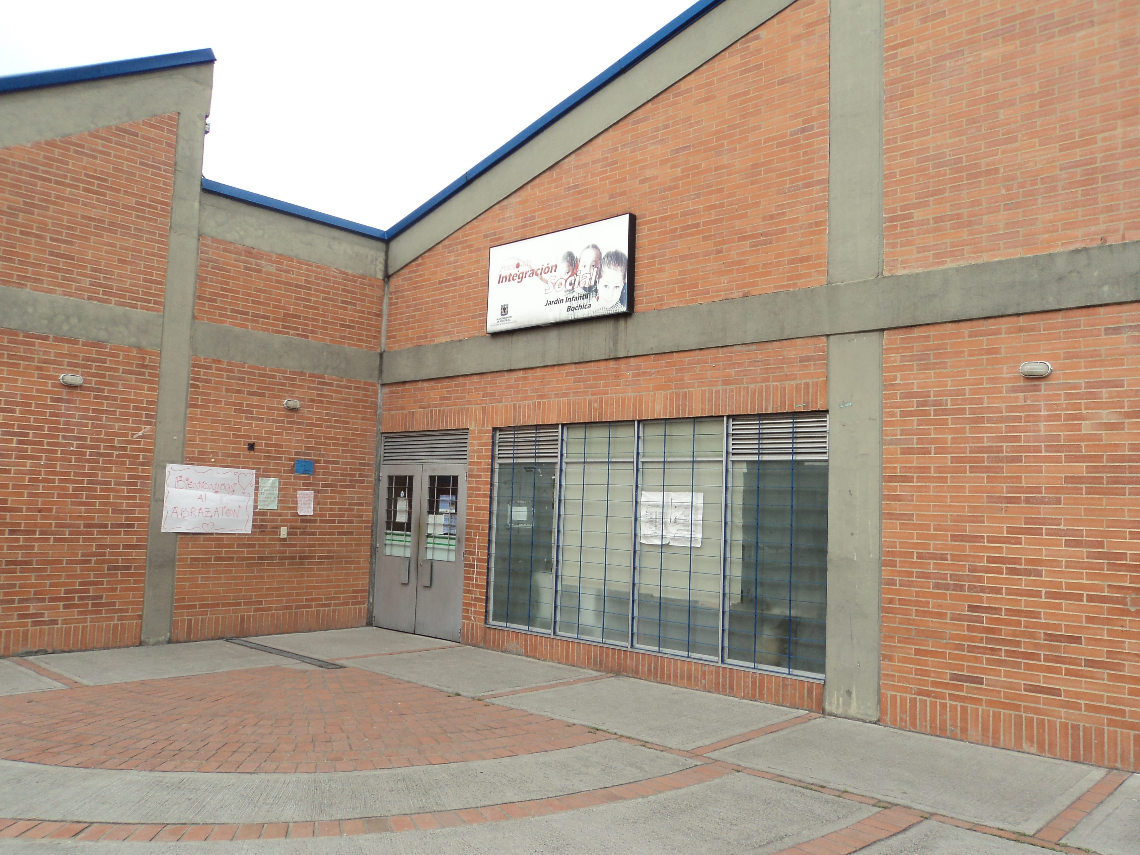 Jardín Infantil Bochica Central